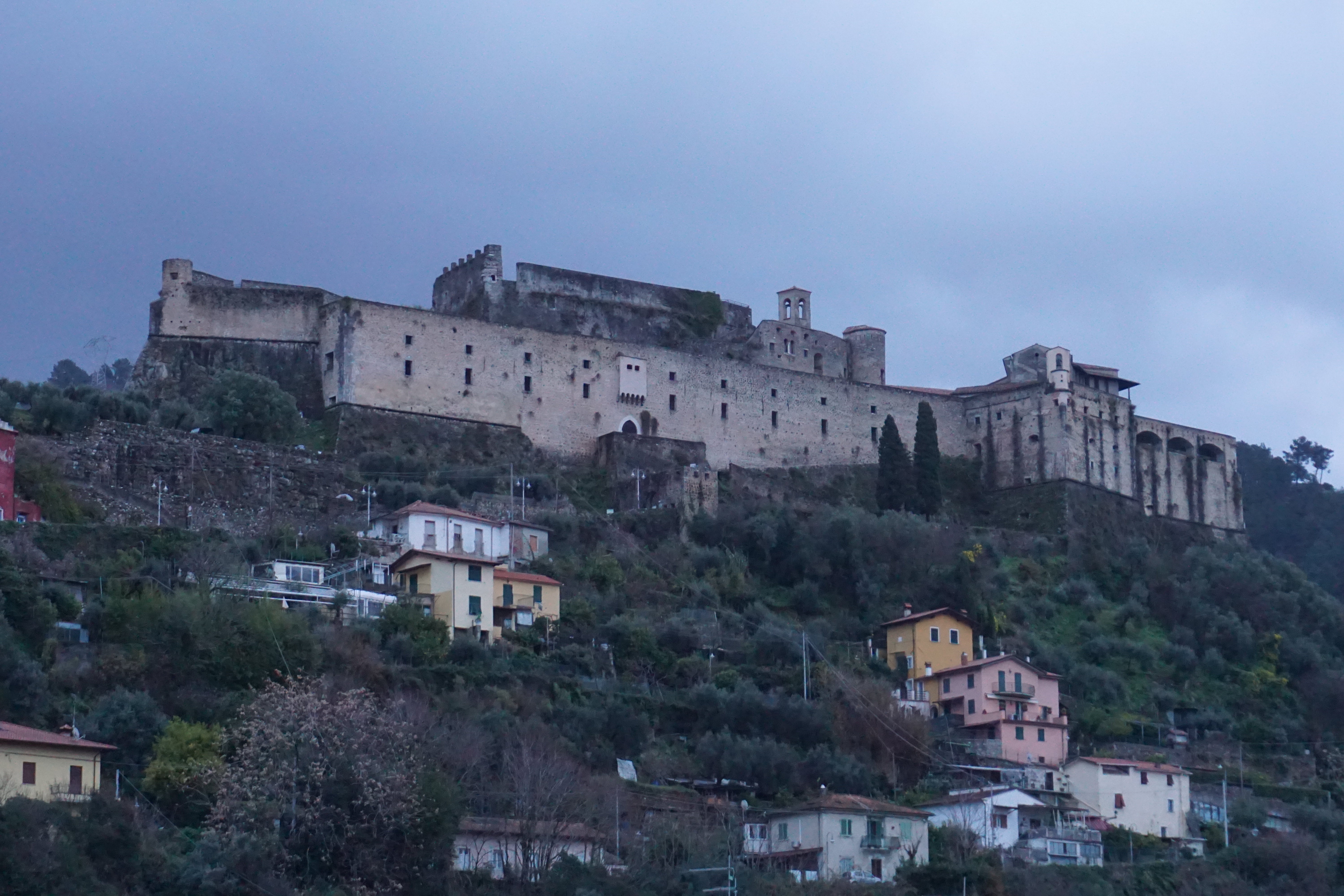 Rocca Malaspina This is a photo of a monument which is part of cultural heritage of Italy.